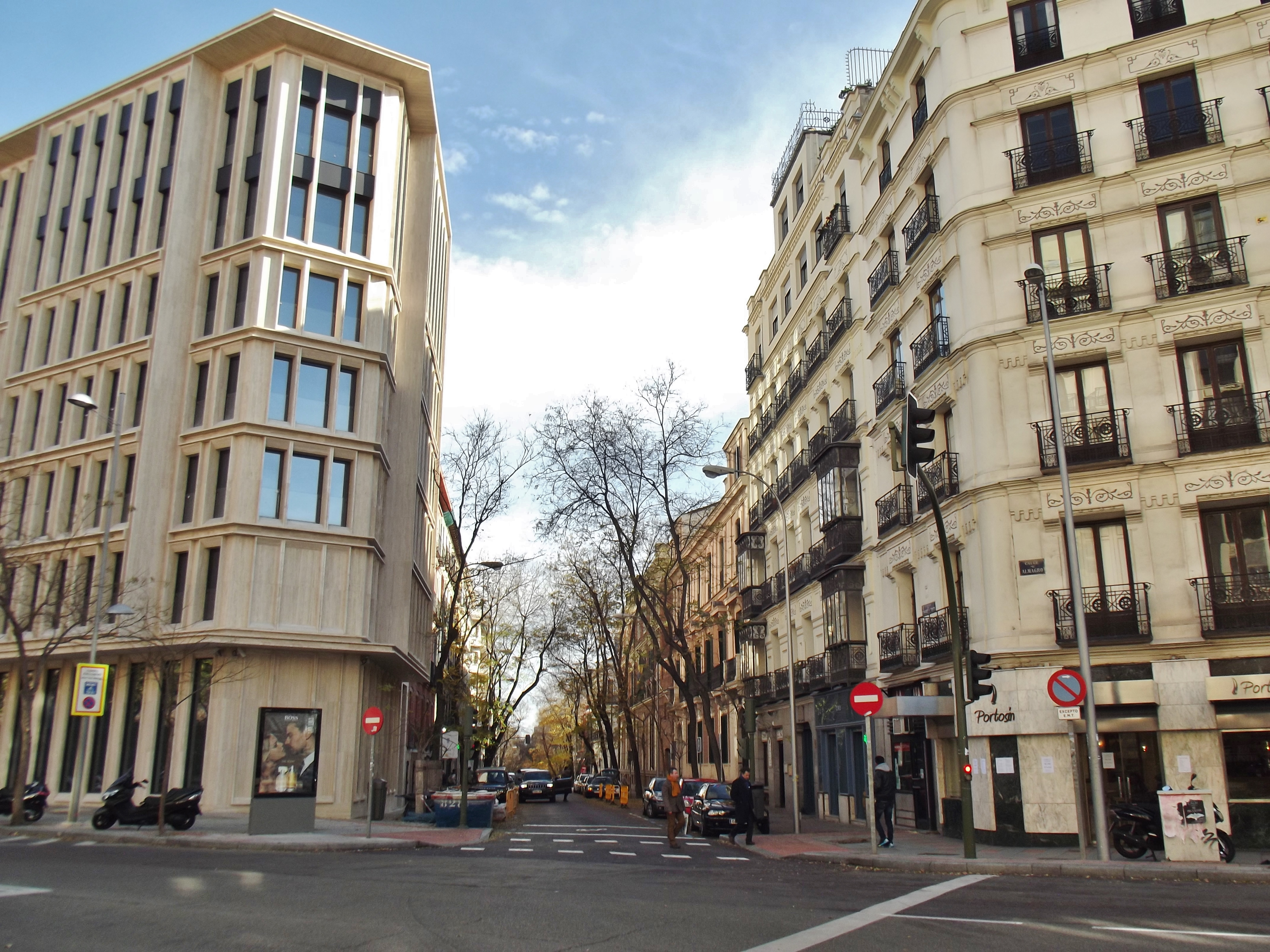 Calle de Fernando el Santo, Madrid.